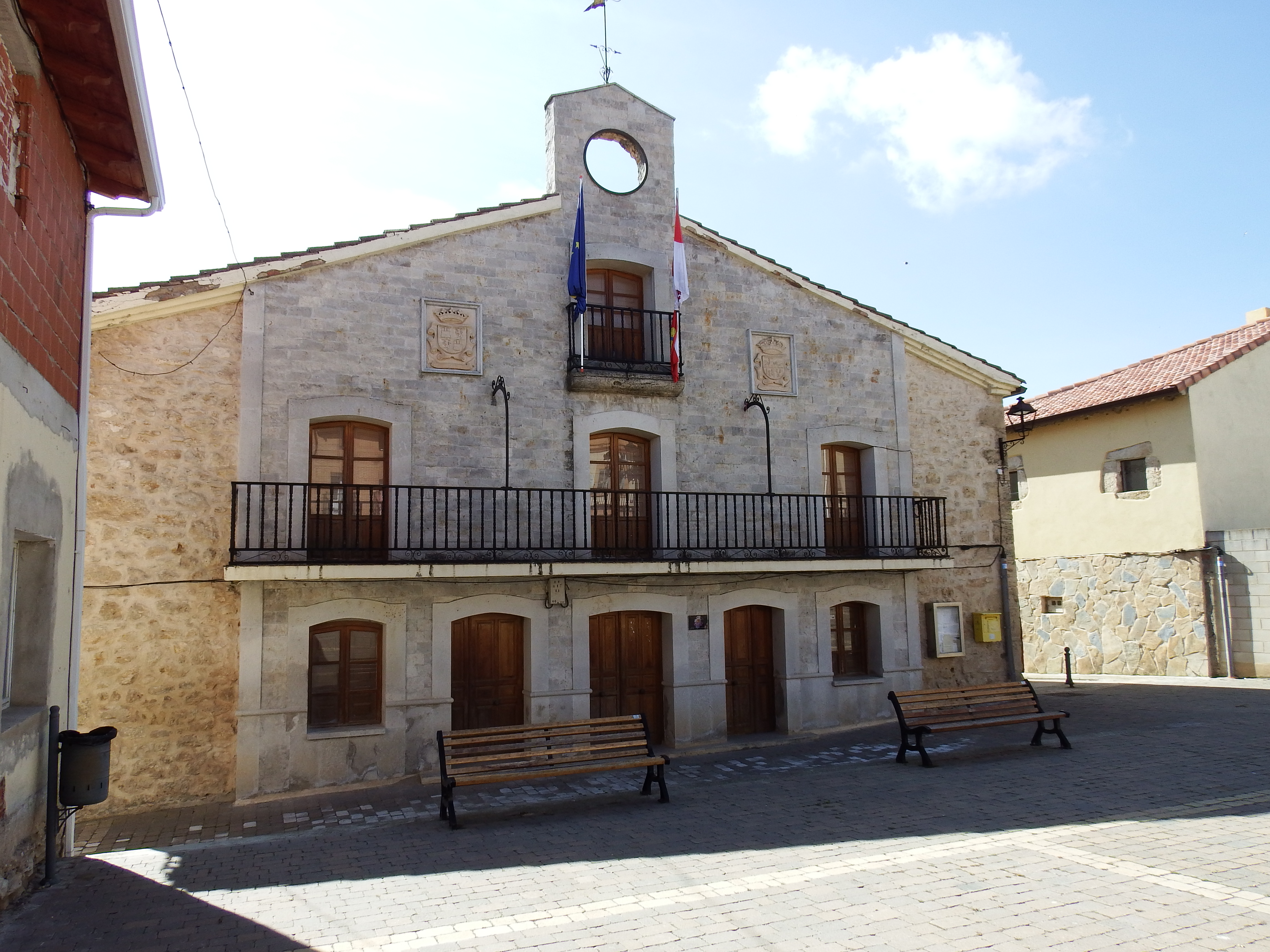 Ayuntamiento de Quemada